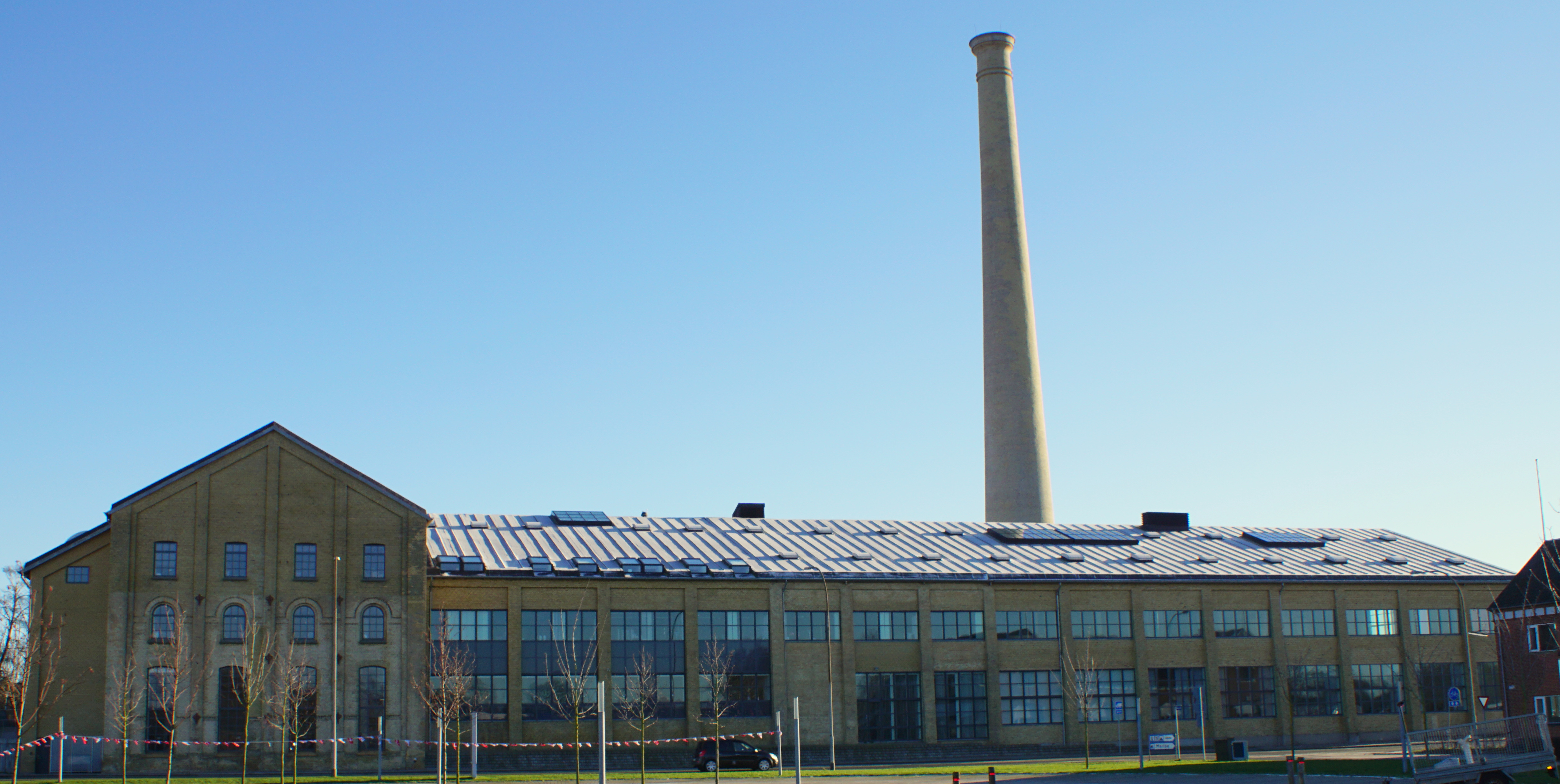 Rådhuset i Assens. Bygningen er en tidligere sukkerfabrik.